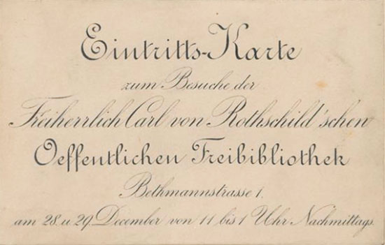 Eintrittskarte in die Rothschildsche Bibliothek in Frankfurt